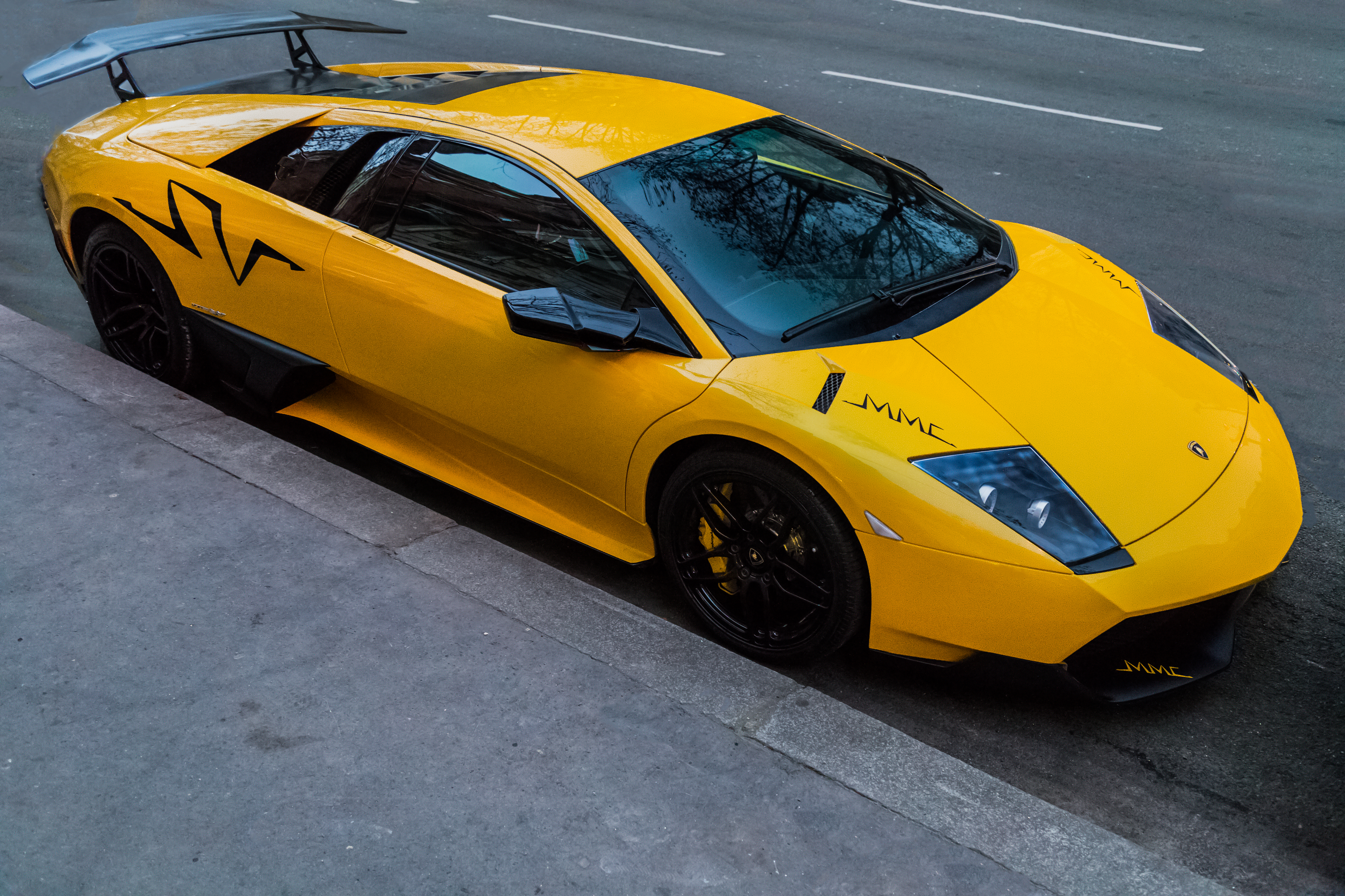 Murcielago SV